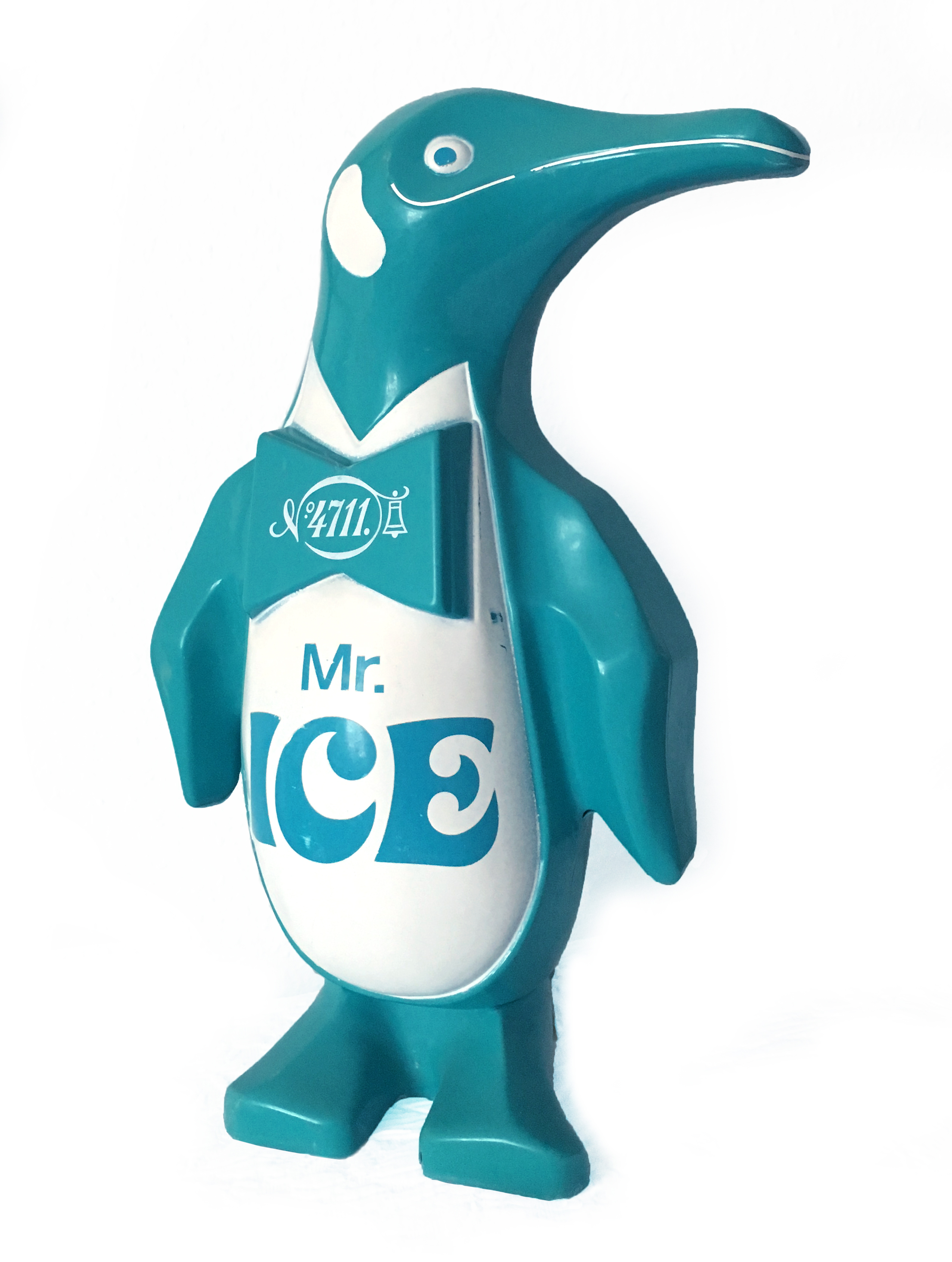 Mr. Ice, Pinguinfigur, Werbefigur der Firma 4711 aus den 1960er Jahren für "Mr. Ice-Kindershampoo"